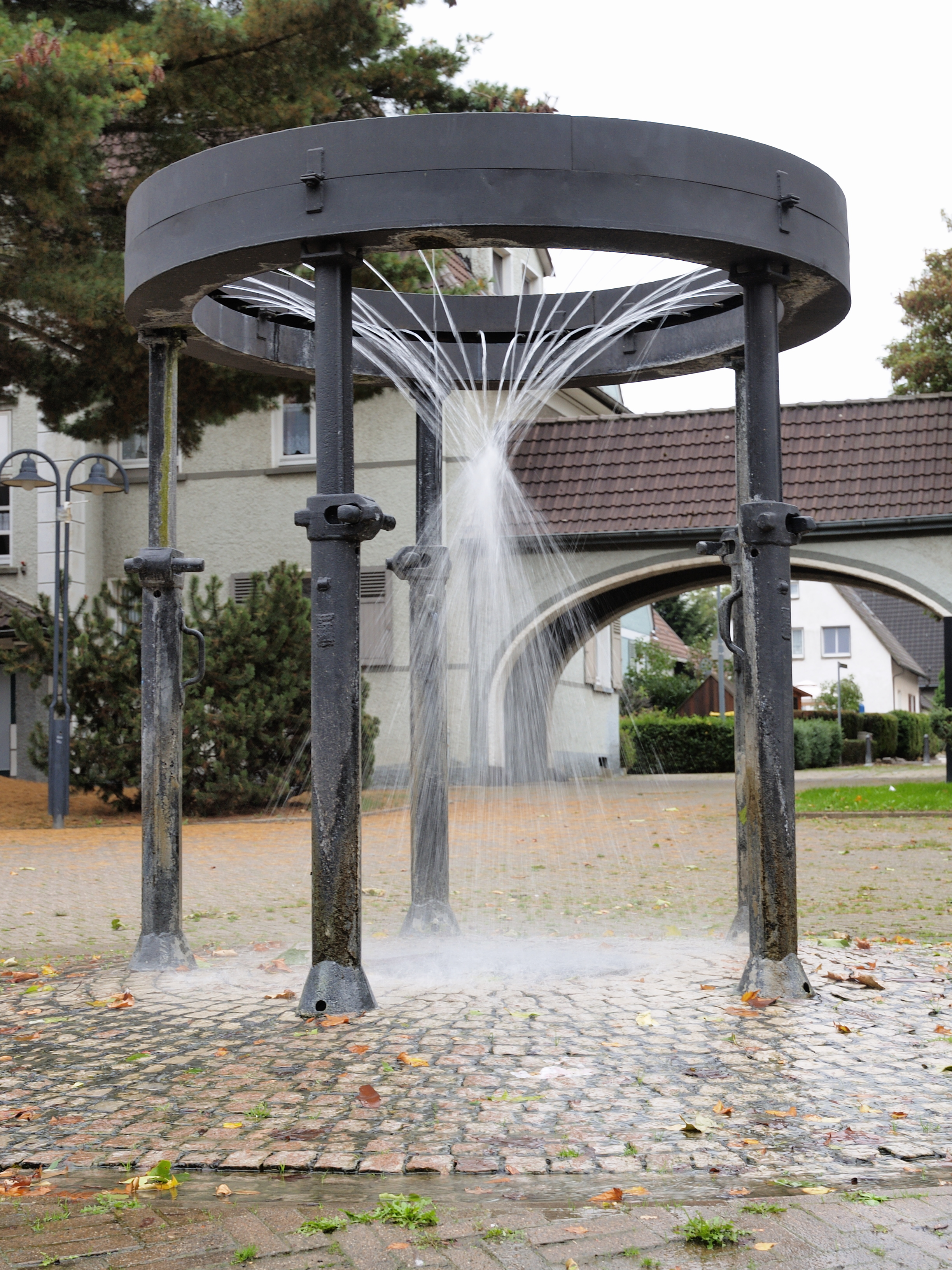 Brunnen in der Zechensiedlung Dahlhauser Heide in Bochum mit Reibungsstempeln aus dem Bergbau